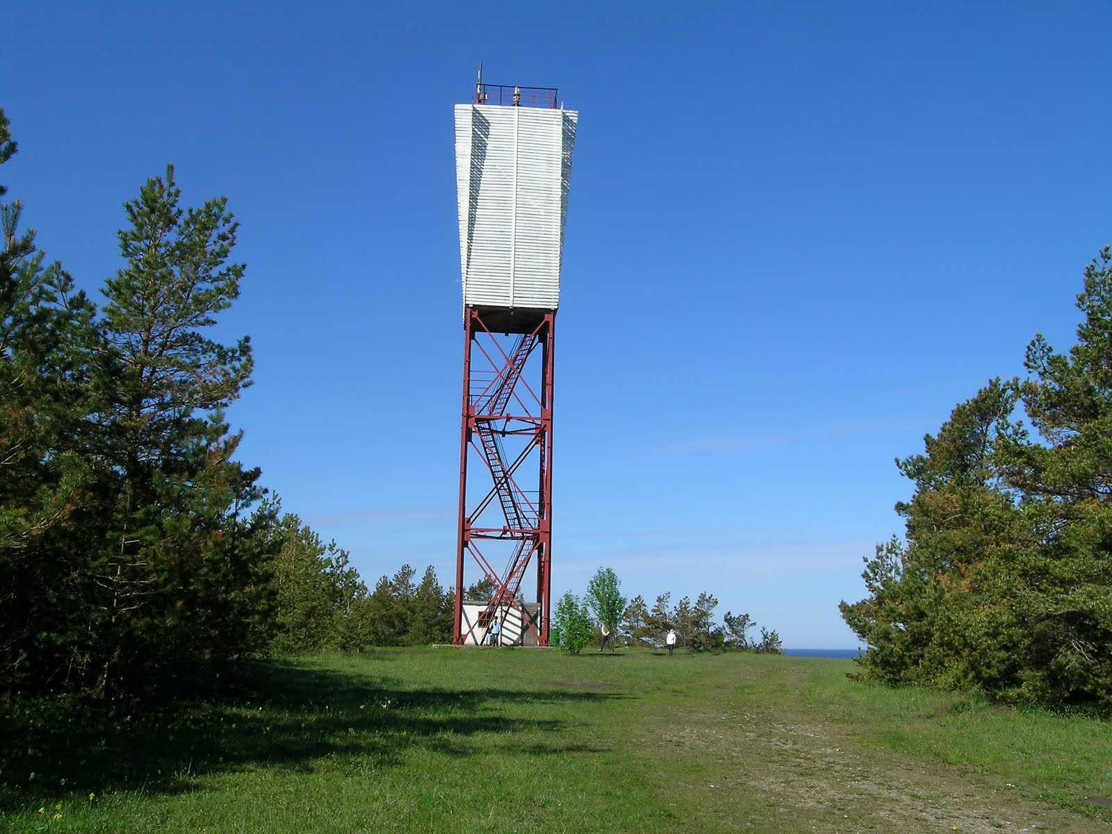 Panga tulepaak